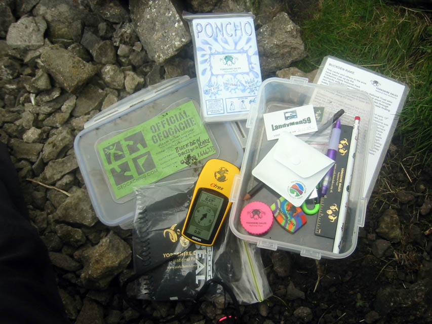 Geocache with GPS navigator